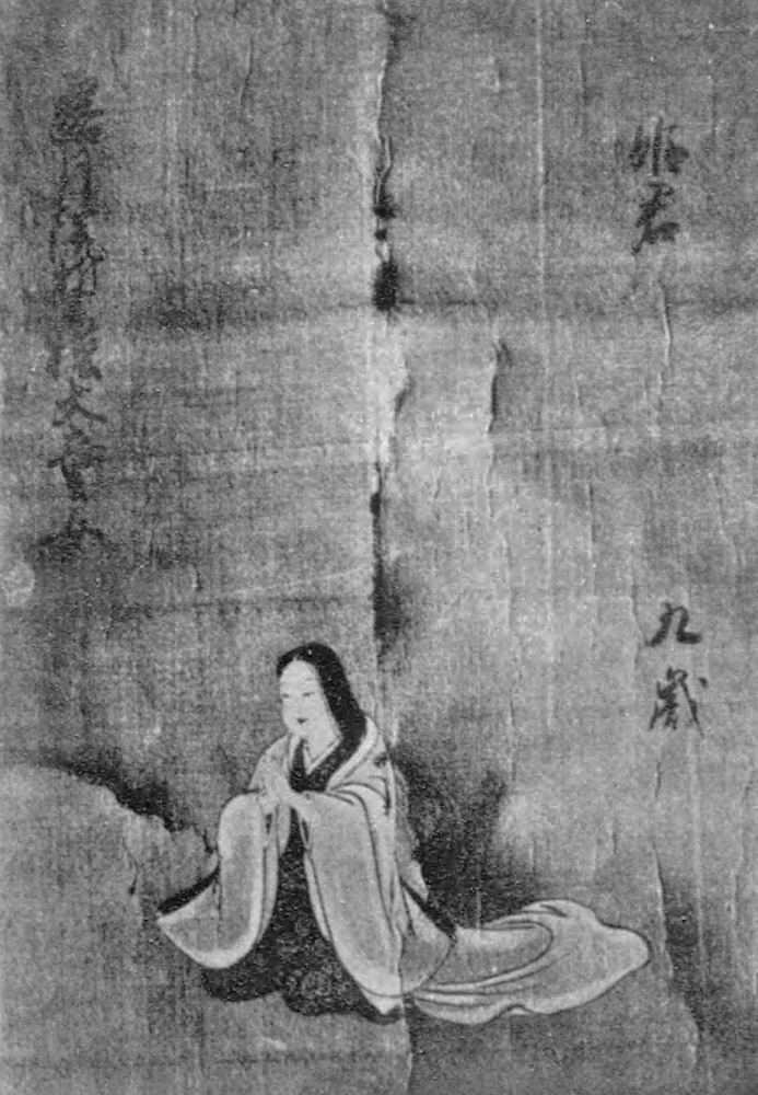 豊臣秀次長女露月院（京都瑞泉寺所蔵）